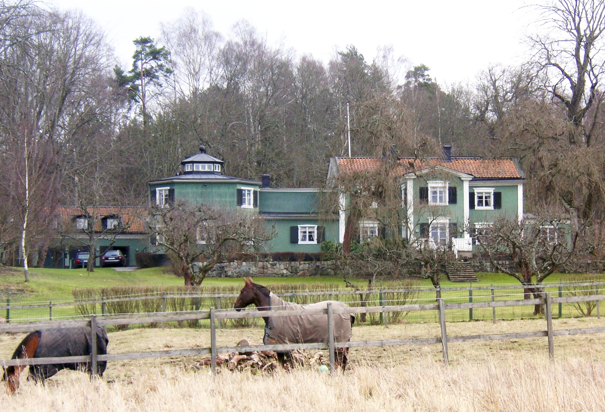 Vilss Gröndal på Djurgården i Stockholm